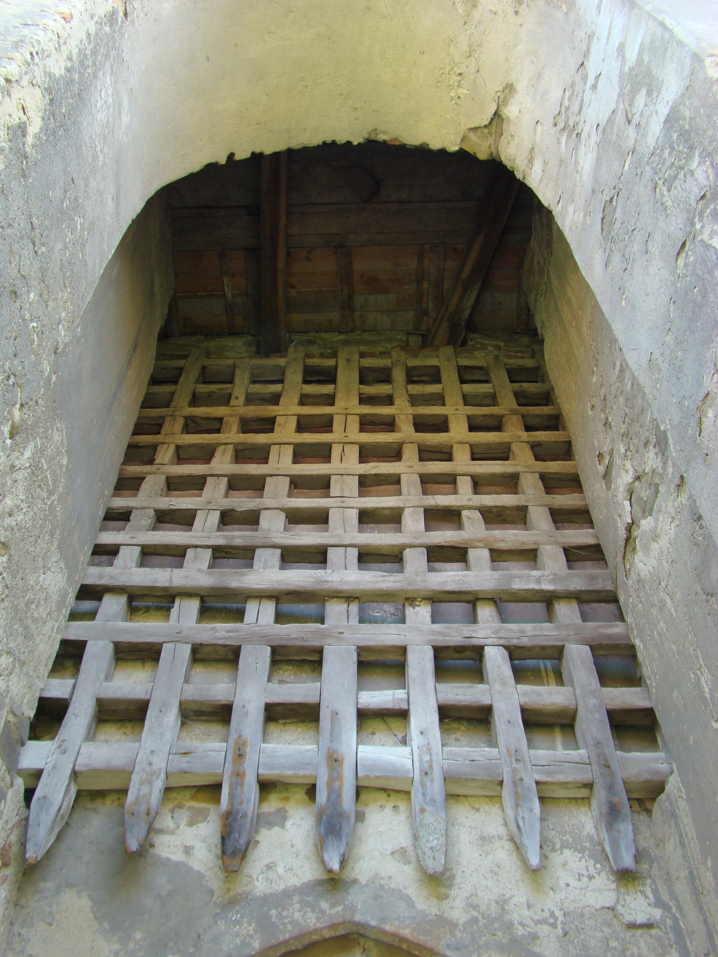 Biserica evanghelică fortificată din Valea Viilor, județul Sibiu 01